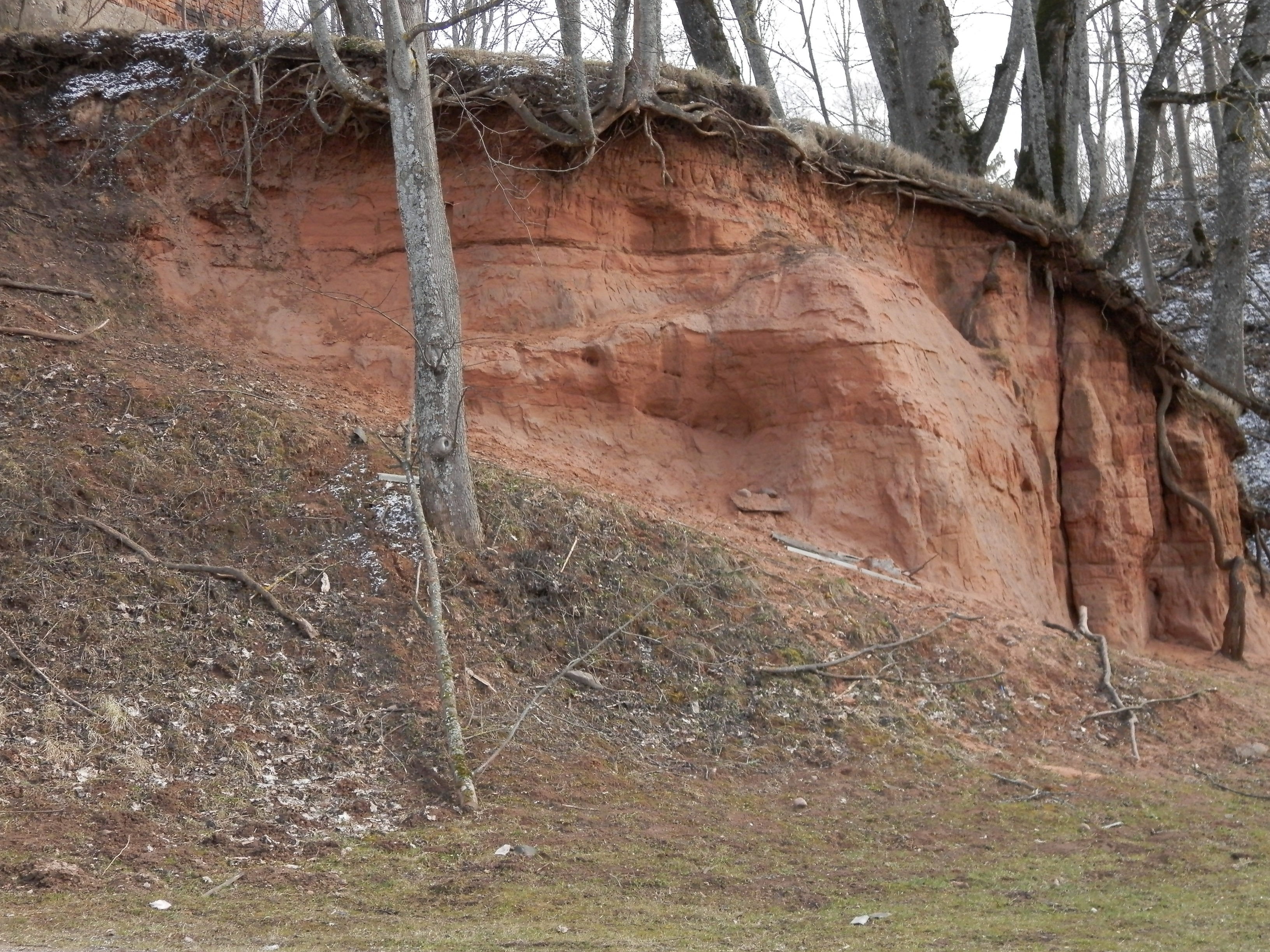 Viljandi lossimägede paljand